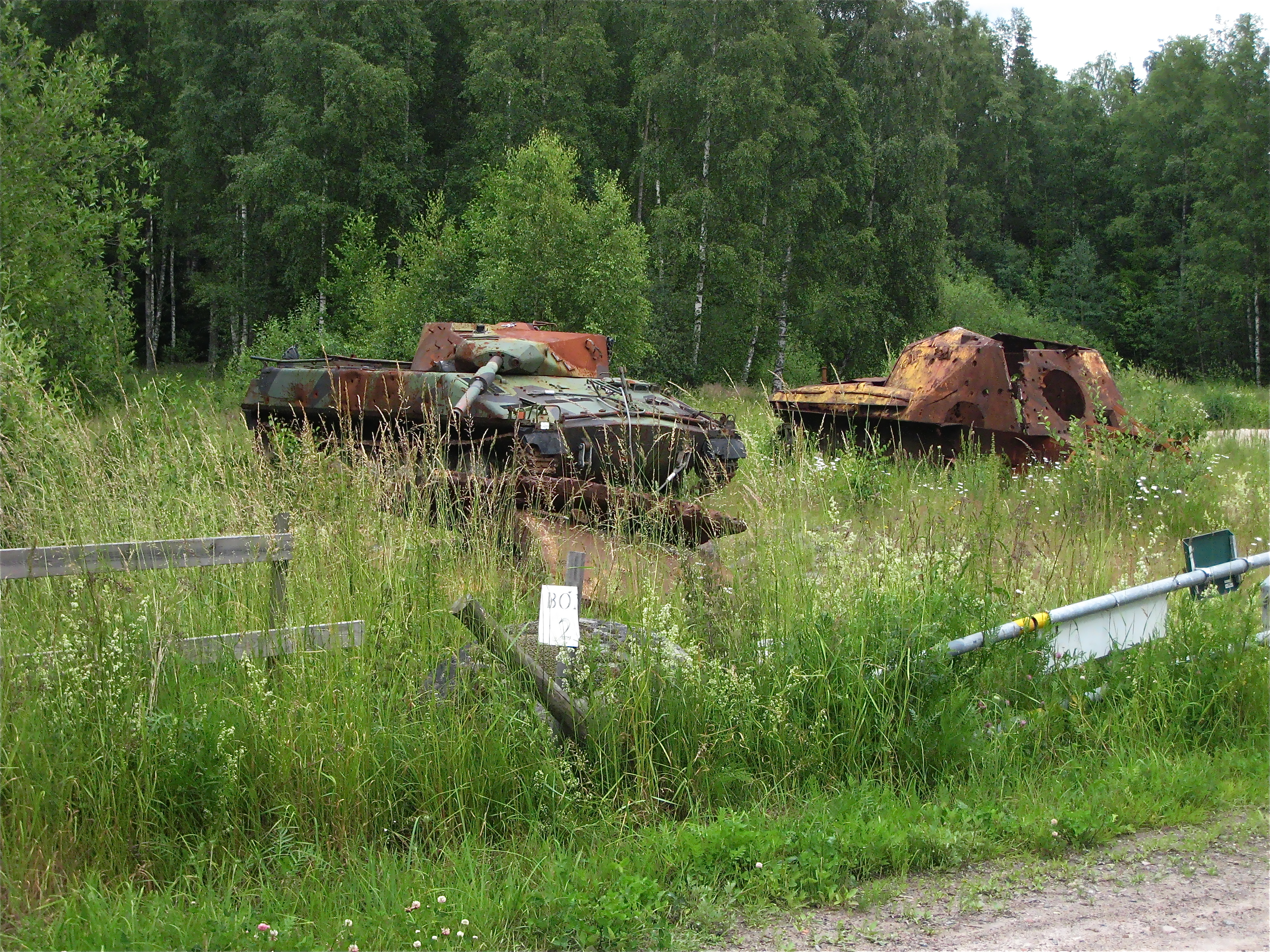 Utö Skjutfält